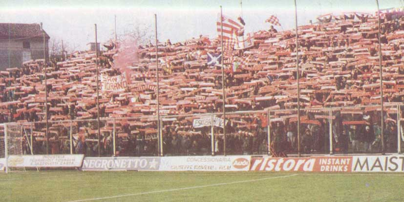 foto derby del po